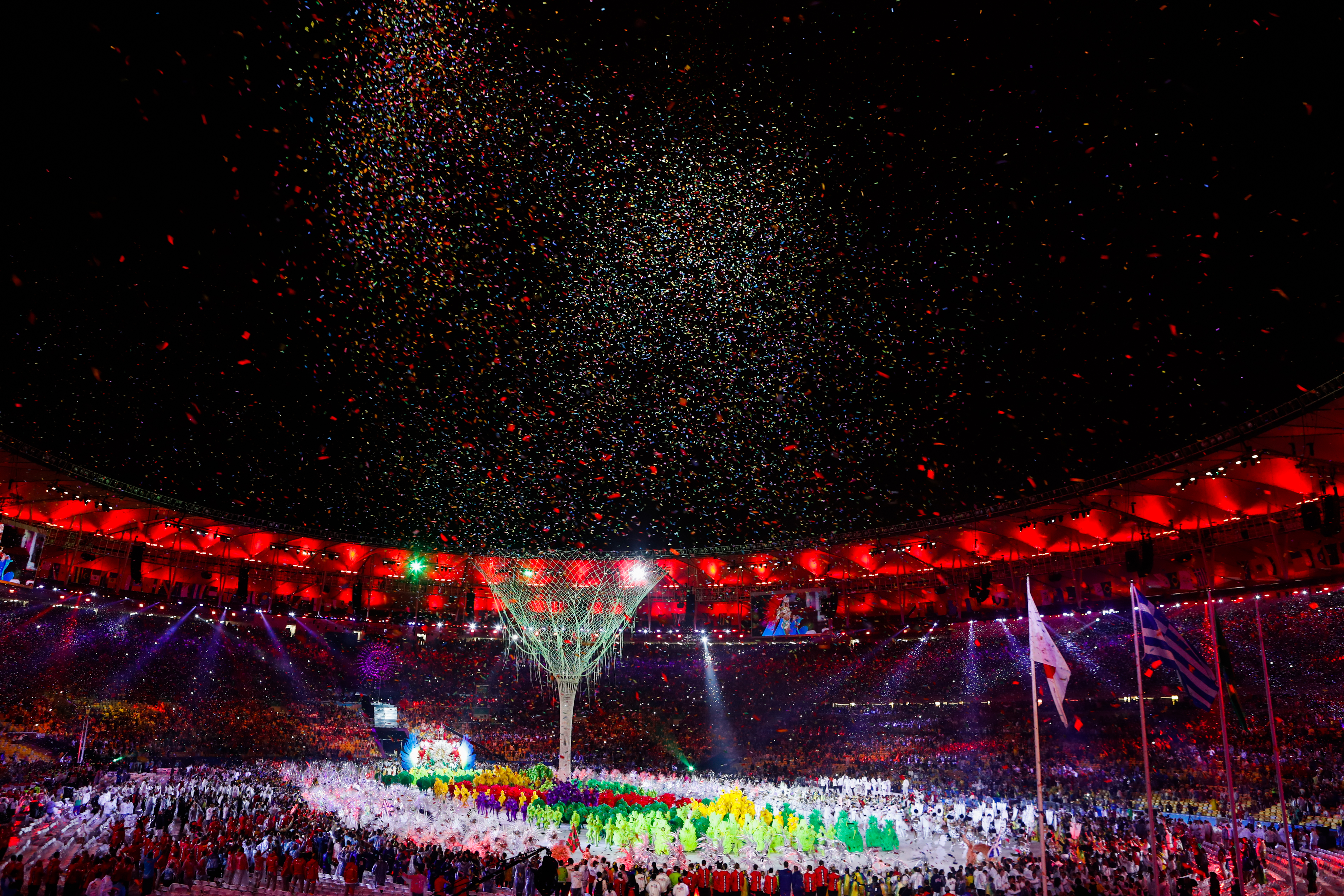 Rio de Janeiro - Cerimônia de encerramento dos Jogos Olímpicos Rio 2016, no Maracanã ( Fernando Frazão/Agência Brasil)